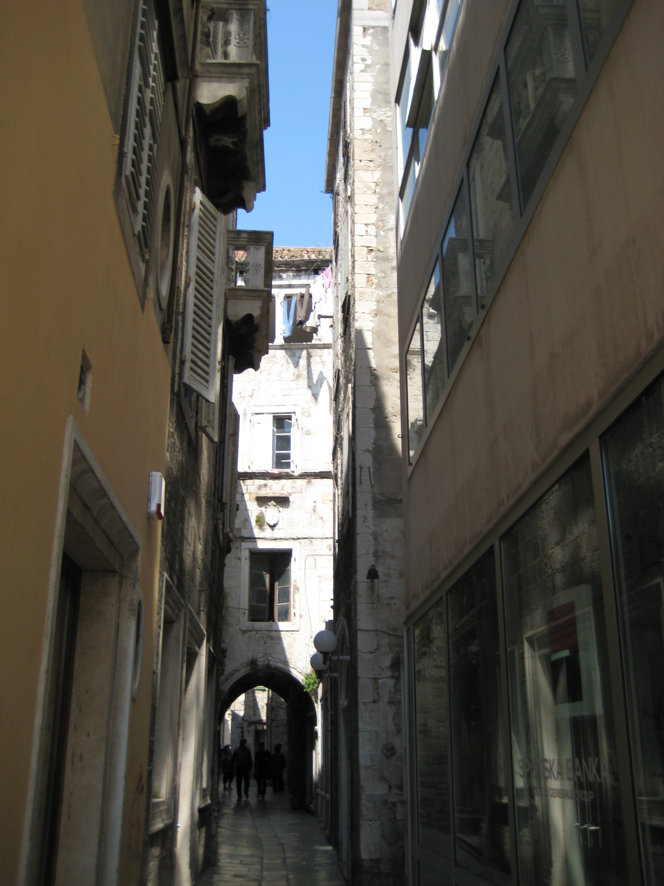 Jedna od brojnih uskih ulica unutar stare gradske jezgre u Splitu, tzv. kala.